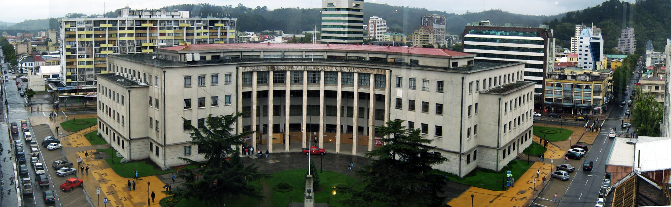 Palacio de Tribunales de Concepción. Sede de la Corte de Apelaciones y juzgados civiles y del trabajo de la ciudad de Concepción, Chile